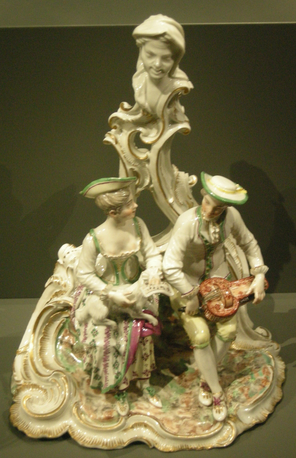 Ngv, manifattura di ludwigsburg, musicisti, 1765-70